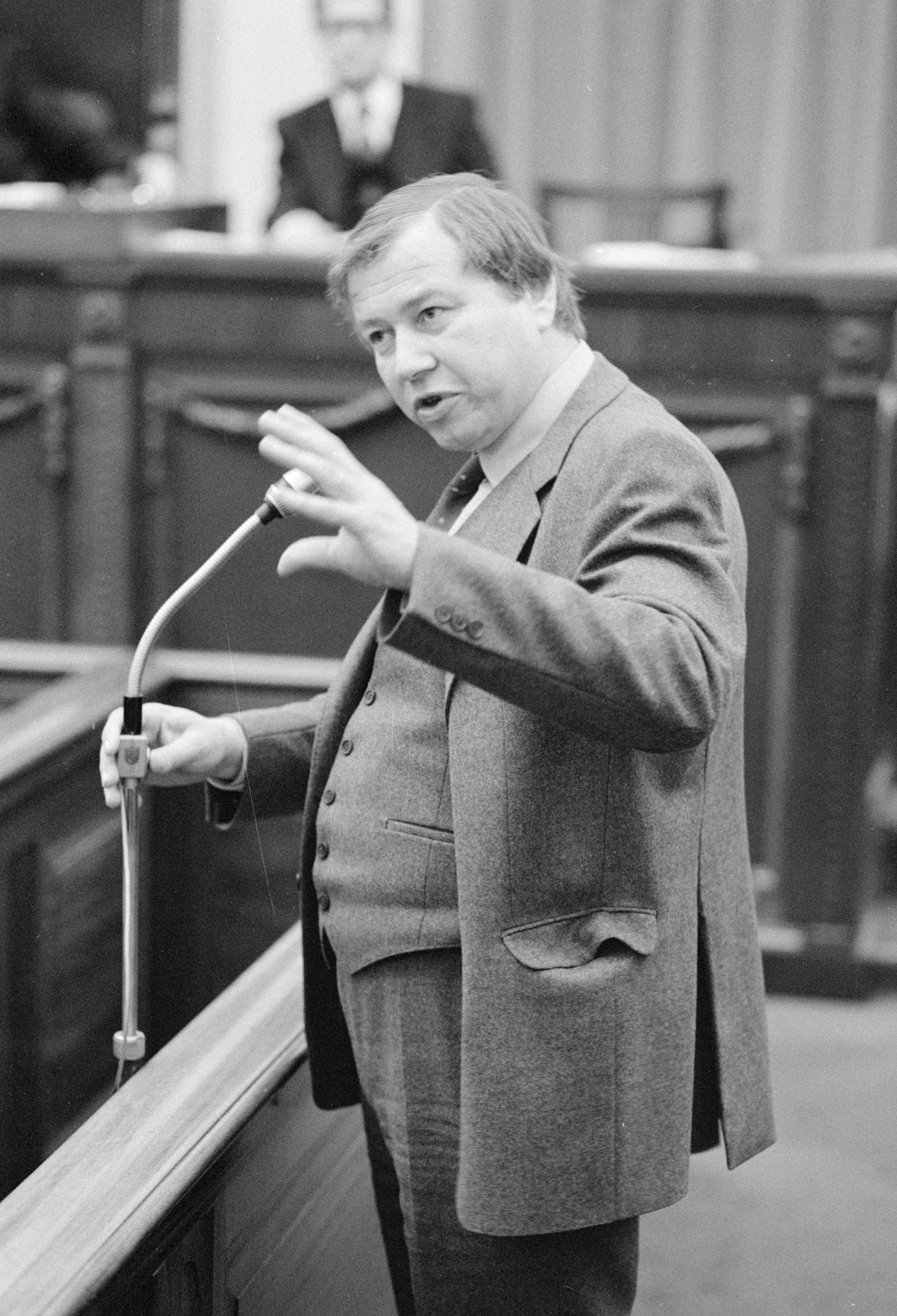 Nationaal Archief Beschrijving: Tweede Kamer debat over Volkhuisvesting, Tweede Kamerlid Marcel van Dam (PvdA) bij interuptie-microfoon Datum: 26 november 1980 Bestanddeelnummer NL-HaNA_Anefo_931-1713 Vervaardiger: Antonisse, Marcel / Anefo URL: Voor meer informatie over het Nationaal Archief: Voor meer foto's uit deze en andere collecties, bezoek onze Beeldbank:, U kunt ons helpen onze kennis van de fotocollecties te verrijken door tags en commentaren toe te voegen. Herkent u mensen of locaties of heeft u een bijzonder verhaal te vertellen bij één van de foto's, laat dan een reactie achter (als u ingelogd bent bij Flickr) of stuur een mailtje naar